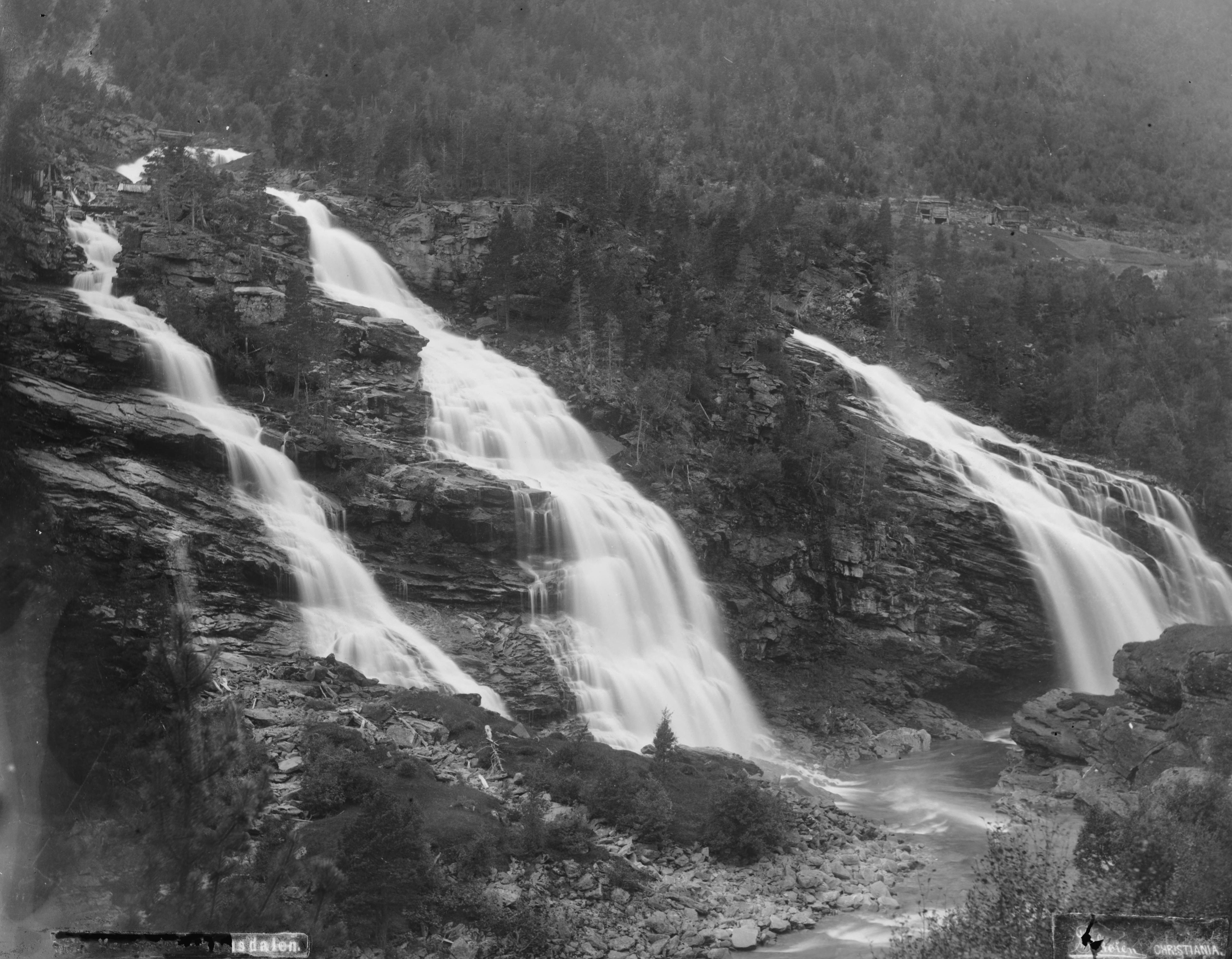 Påskrift negativ: [Uleselig] Skøien Christiania Påskrift konvolutt: 3 fosser. Skøien [Riksantikvaren] Sted: Romsdalen,Vermafossen Kommune: Rauma Fylke: Møre og Romsdal Tagger: landskap foss